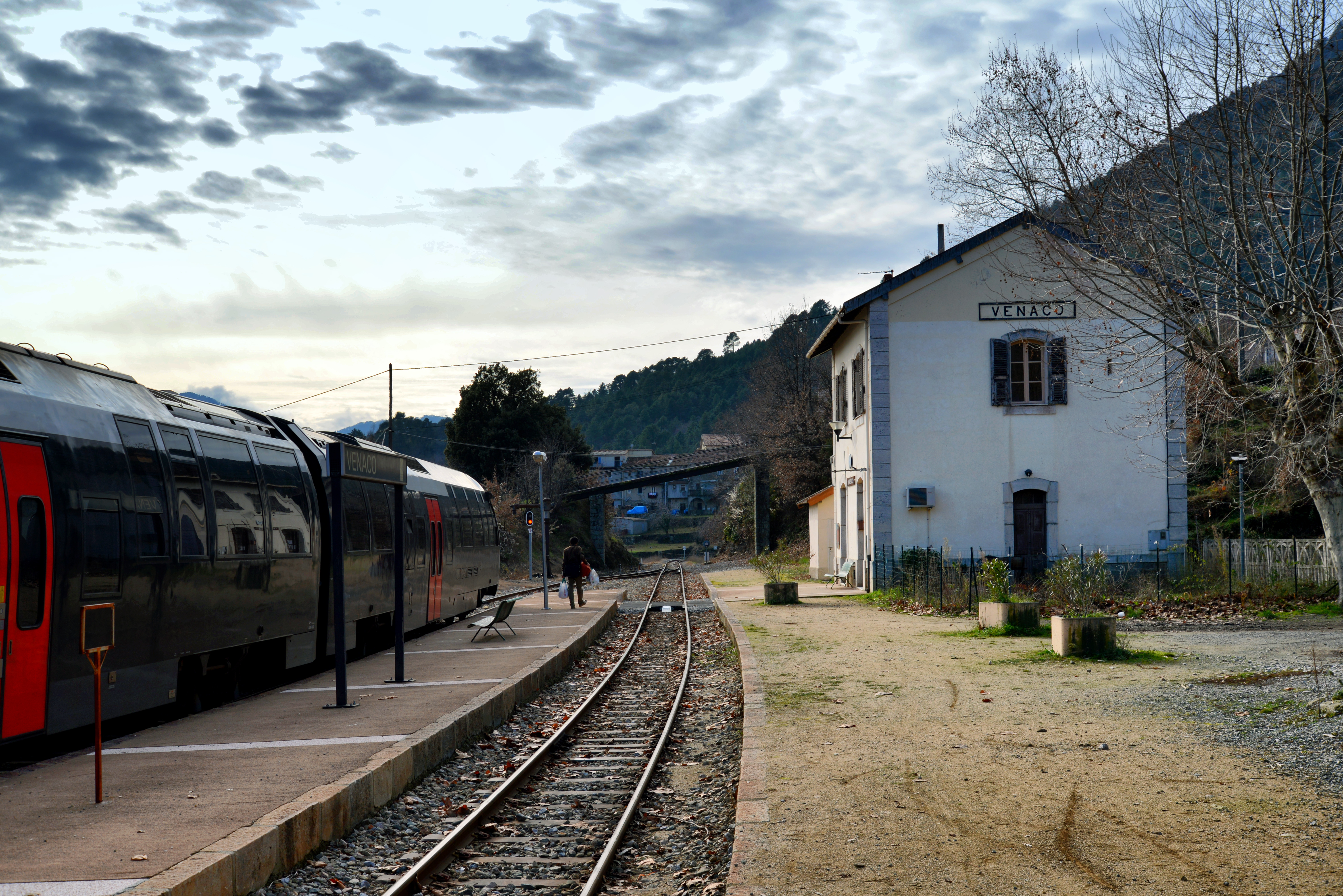 Venaco, Centre Corse) - Rame AMG 800 en gare